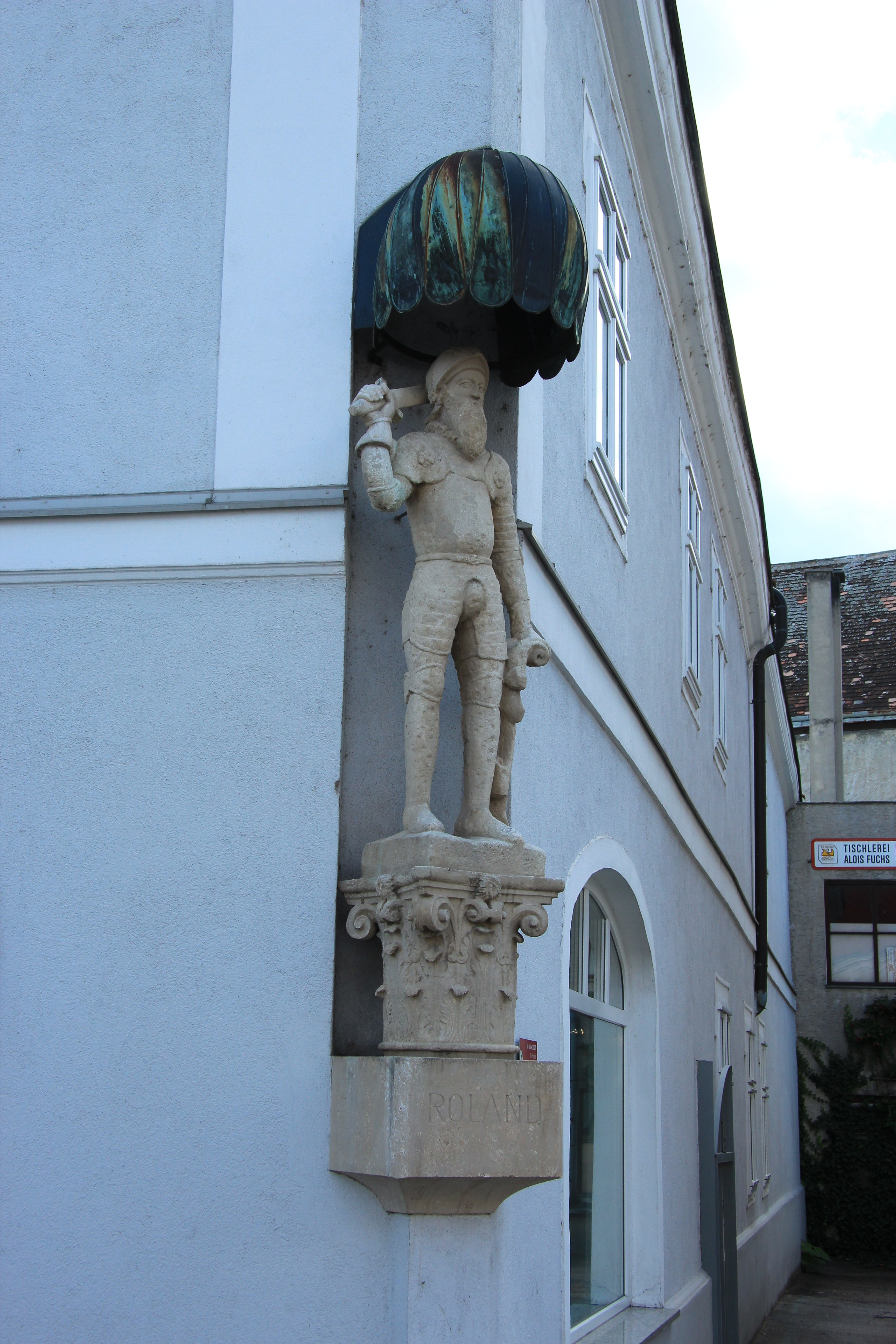 Statue von Roland am Bürgerhaus in Traismauer, Niederösterreich